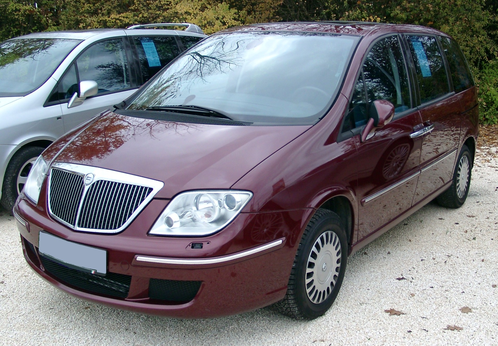 Lancia Phedra 2.2 16v JTD Executive, Baujahr 2003